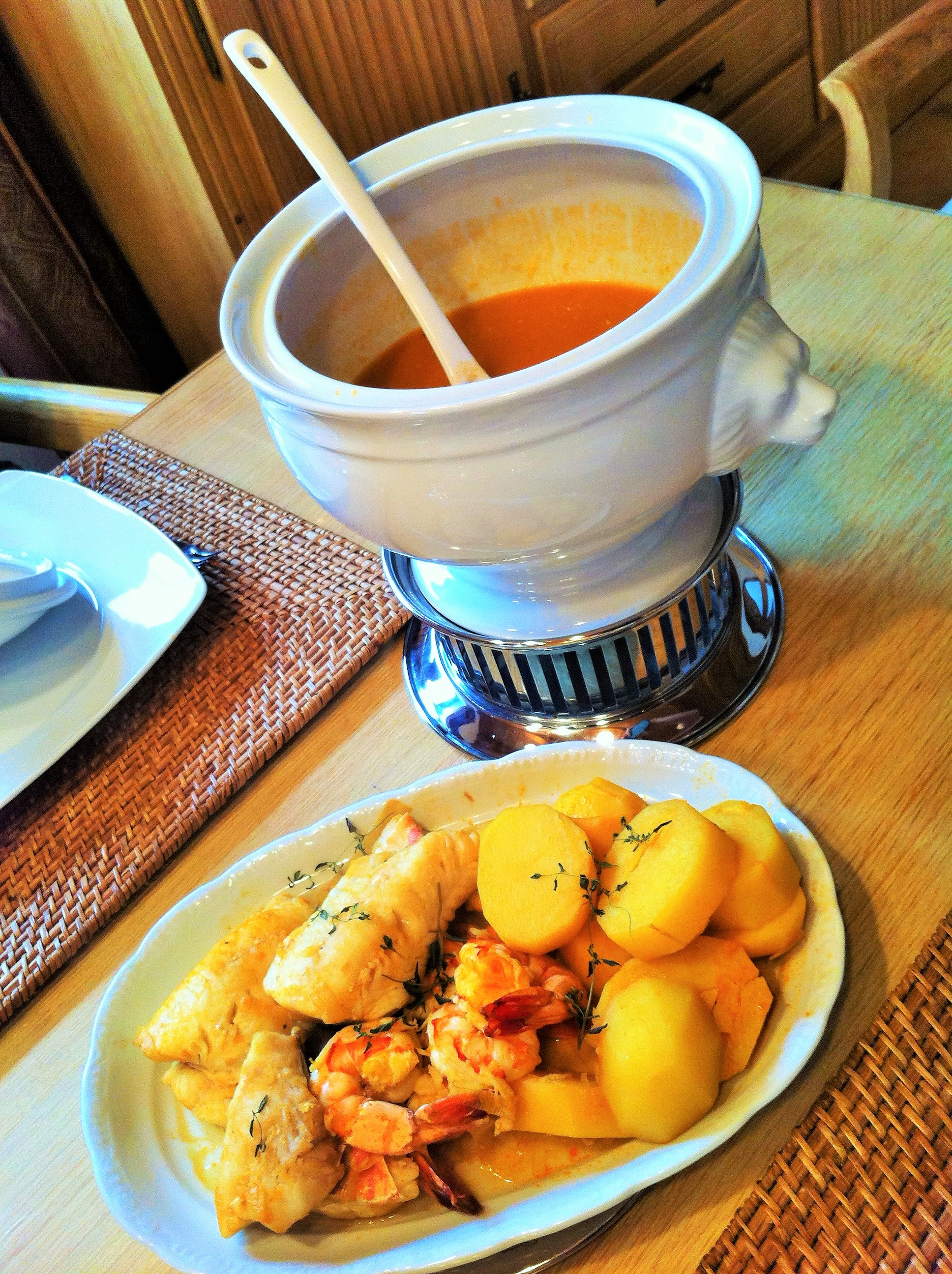 Bouillabaisse